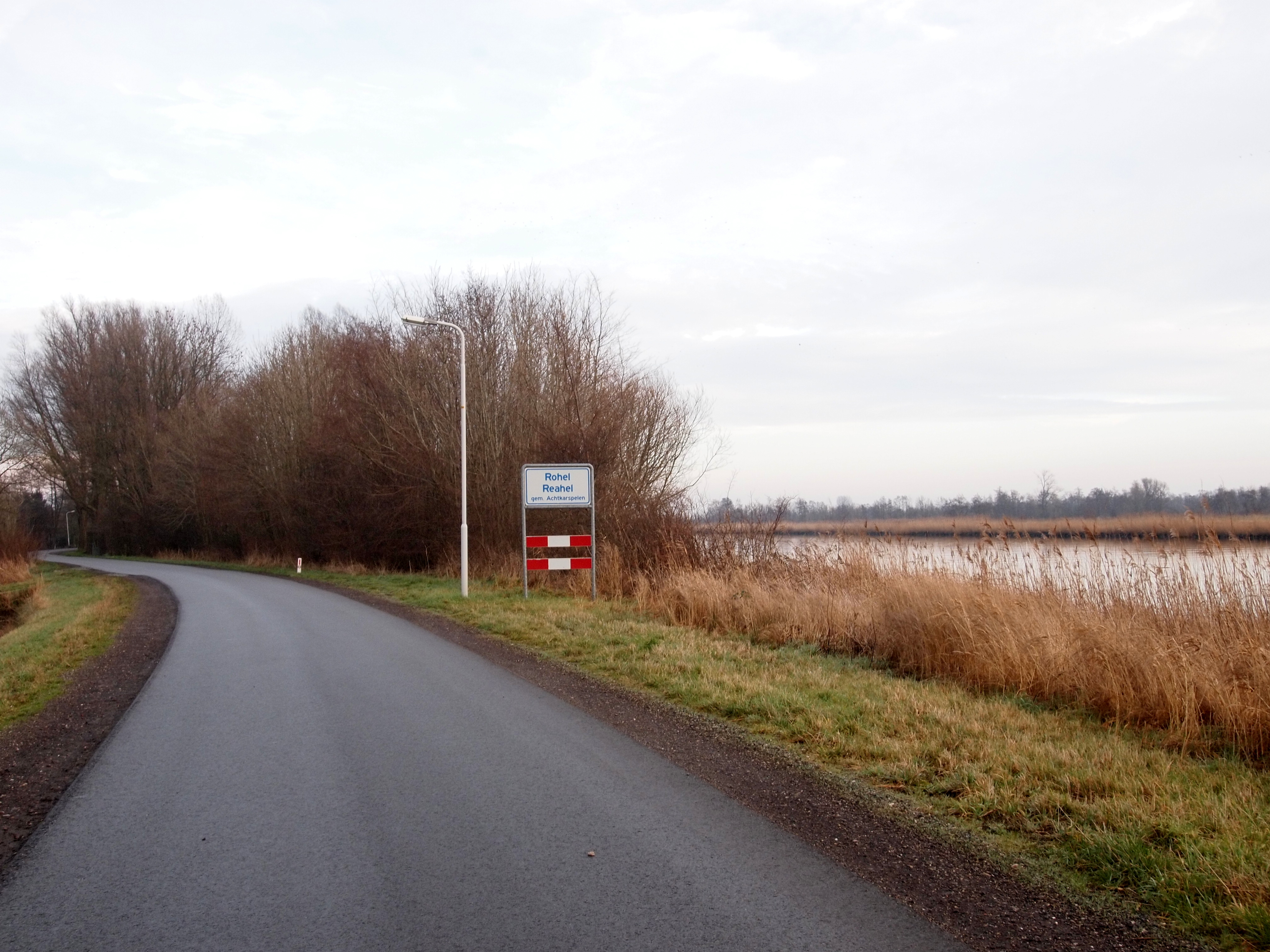 Rohel